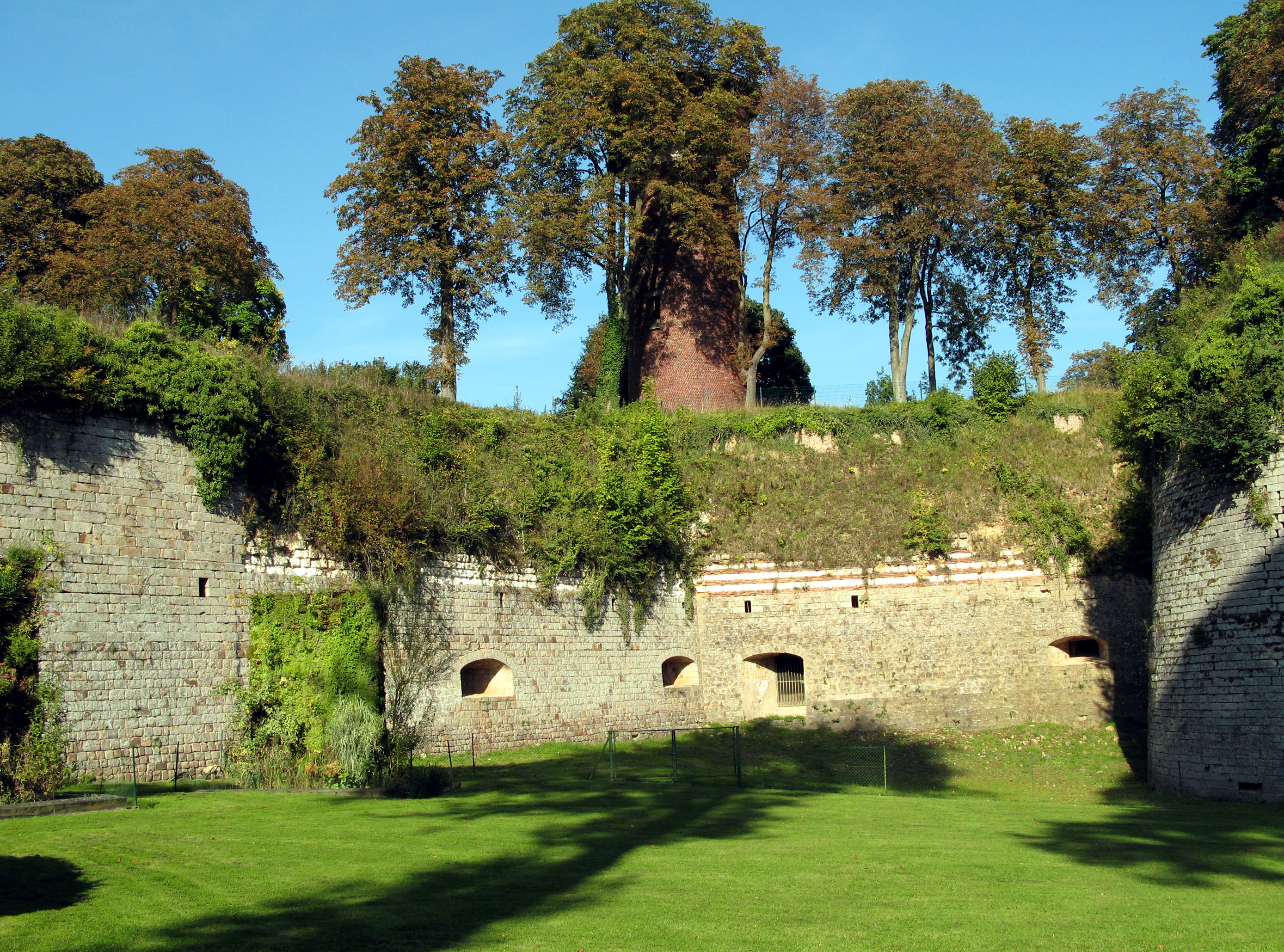 Doullens (Somme, France) - Intérieur de la citadelle. . . .